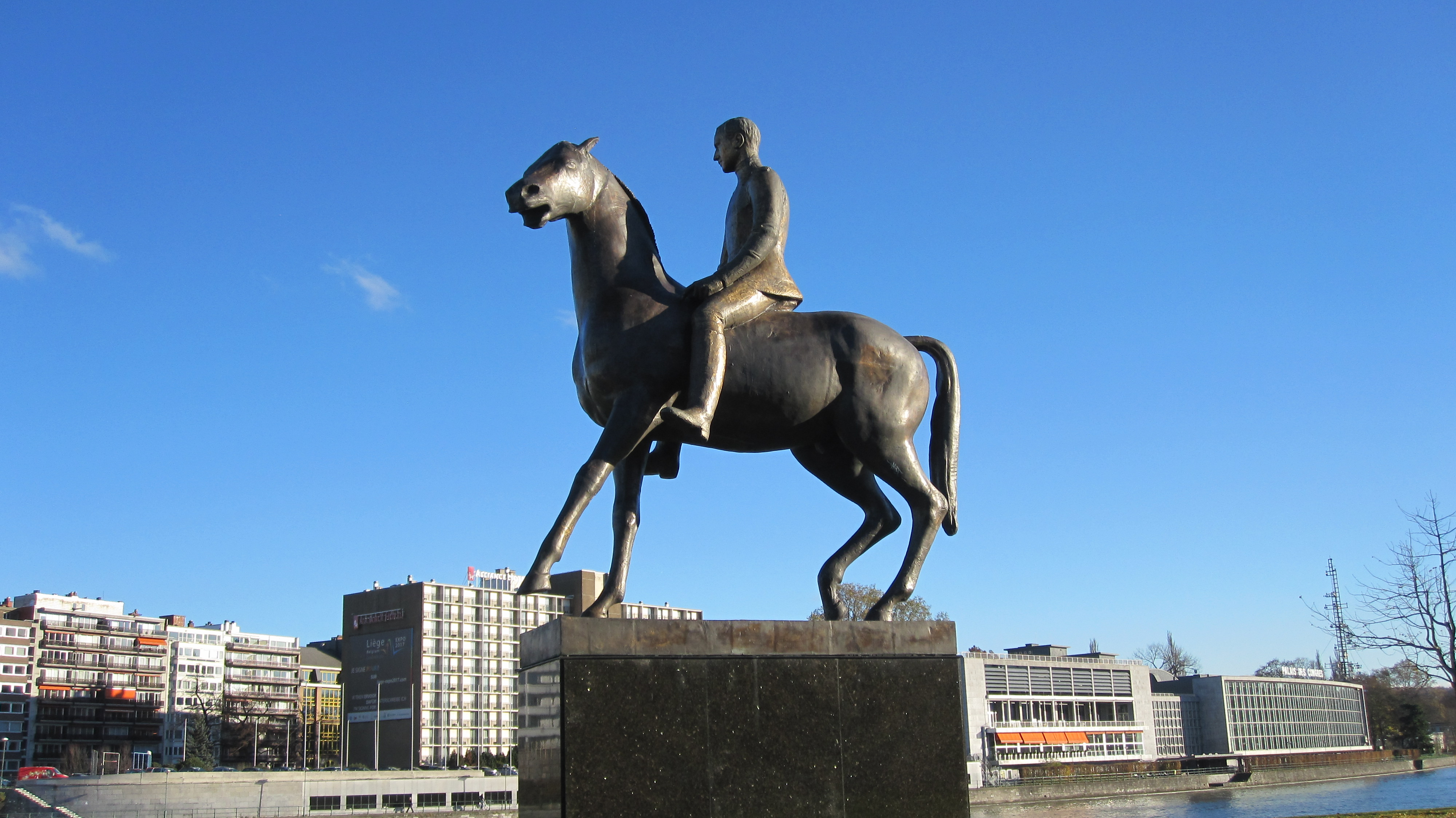 Statue équestre du roi Albert Ier